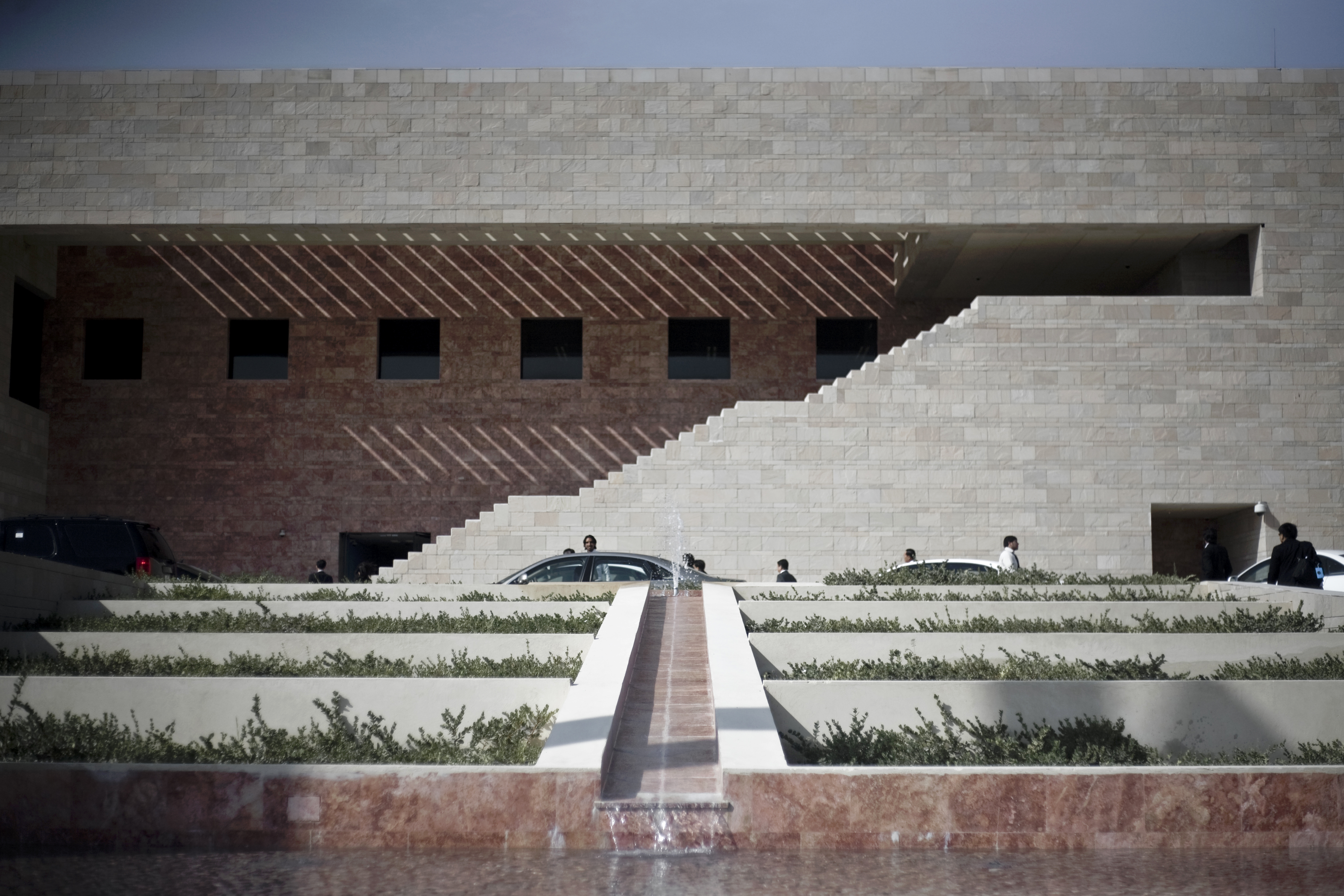 Education City นายกรัฐมนตรีและคณะ ณ รัฐการ์ตาเพื่อเยือนอย่างเป็นทางการ ระหว่างวันที่ 24-26 พฤศจิกายน 2552 25พฤศจิกายน2552 (The Official Site of The Prime Minister of Thailand Photo by พีรพัฒน์ วิมลรังครัตน์)